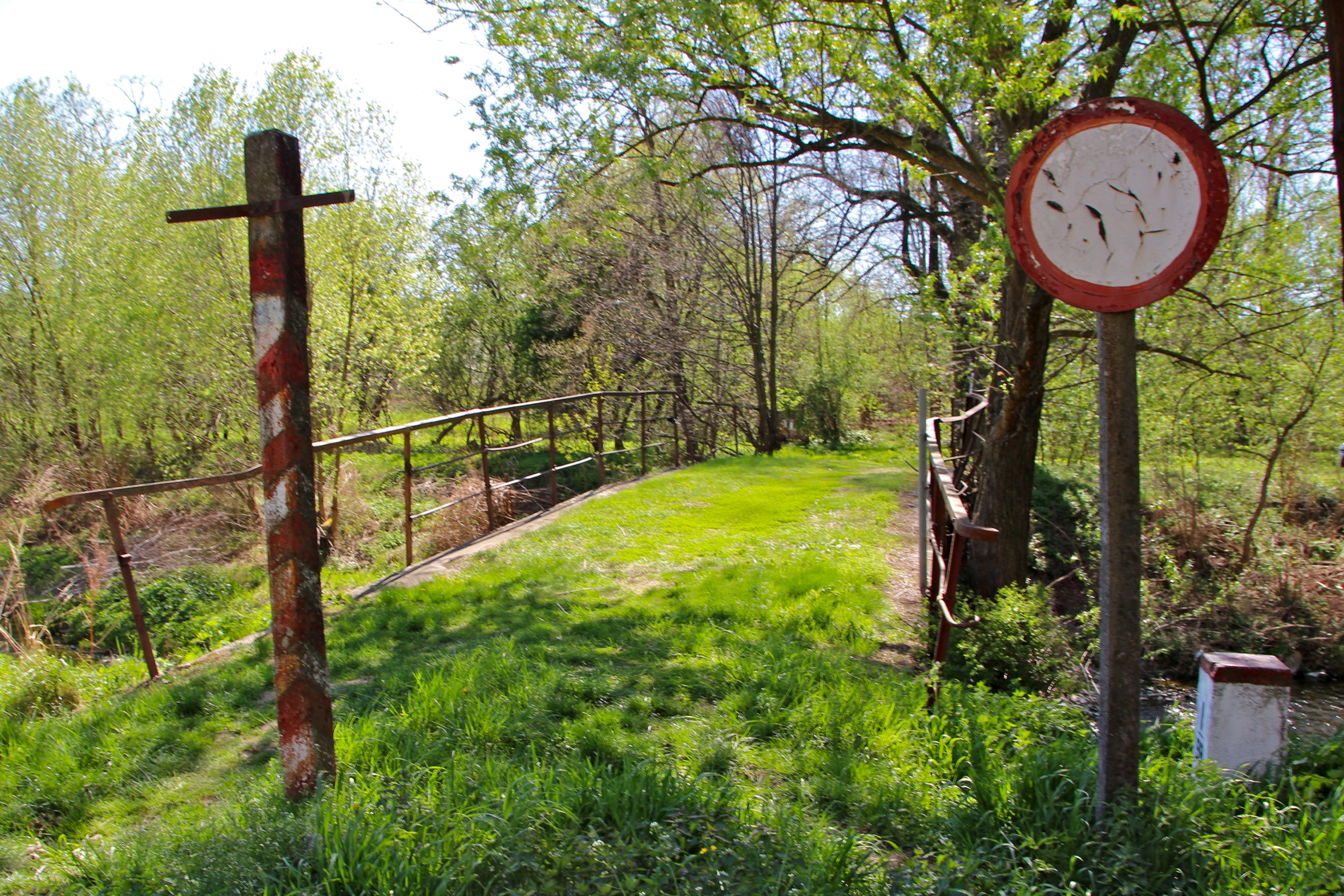 Krasne Pole (niem. Schönwiese) – wieś w Polsce położona w województwie opolskim, w powiecie głubczyckim, w gminie Głubczyce, w gminie Głubczyce.